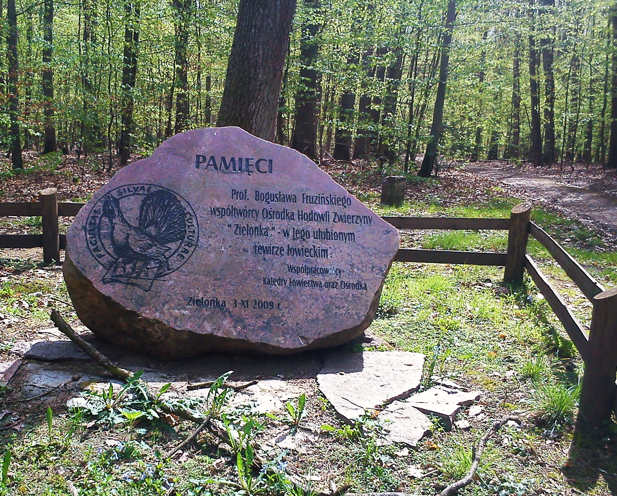 Głaz Fruzińskiego przy Trakcie Bednarskim (Puszcza Zielonka).